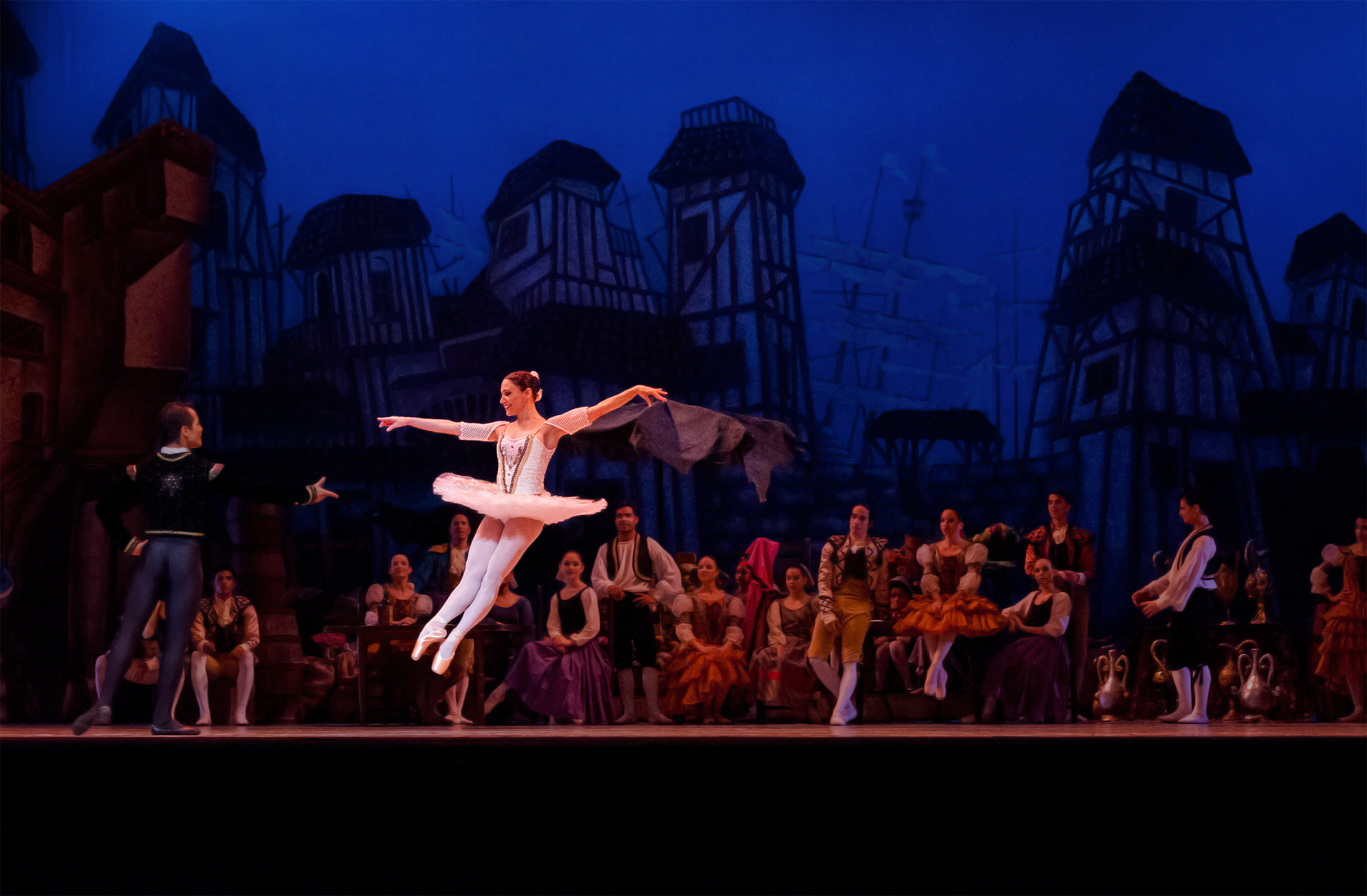 Don Quijote. Música: Ludwig Minkus. Coreografía: Laura Fiorucci basada en la original de Marius Petipa. Susan Bello y Henry Montilla con el Ballet Teresa Carreño. Teatro Teresa Carreño. Venezuela, 18 de octubre de 2013.